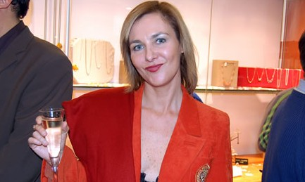 Pamela Jiles, periodista chilena.